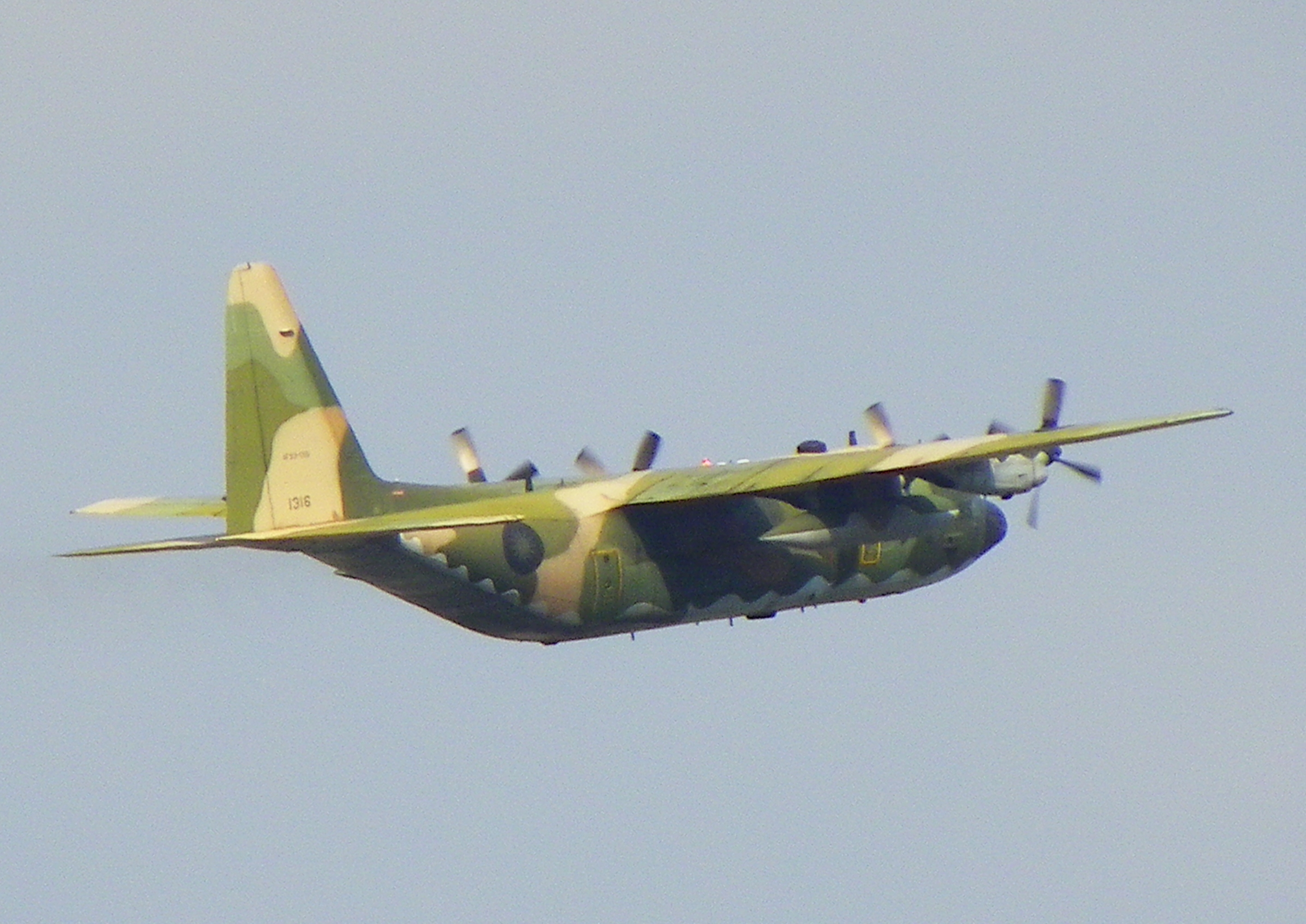 自臺北松山機場起飛後爬昇中的中華民國空軍C-130H 1316。